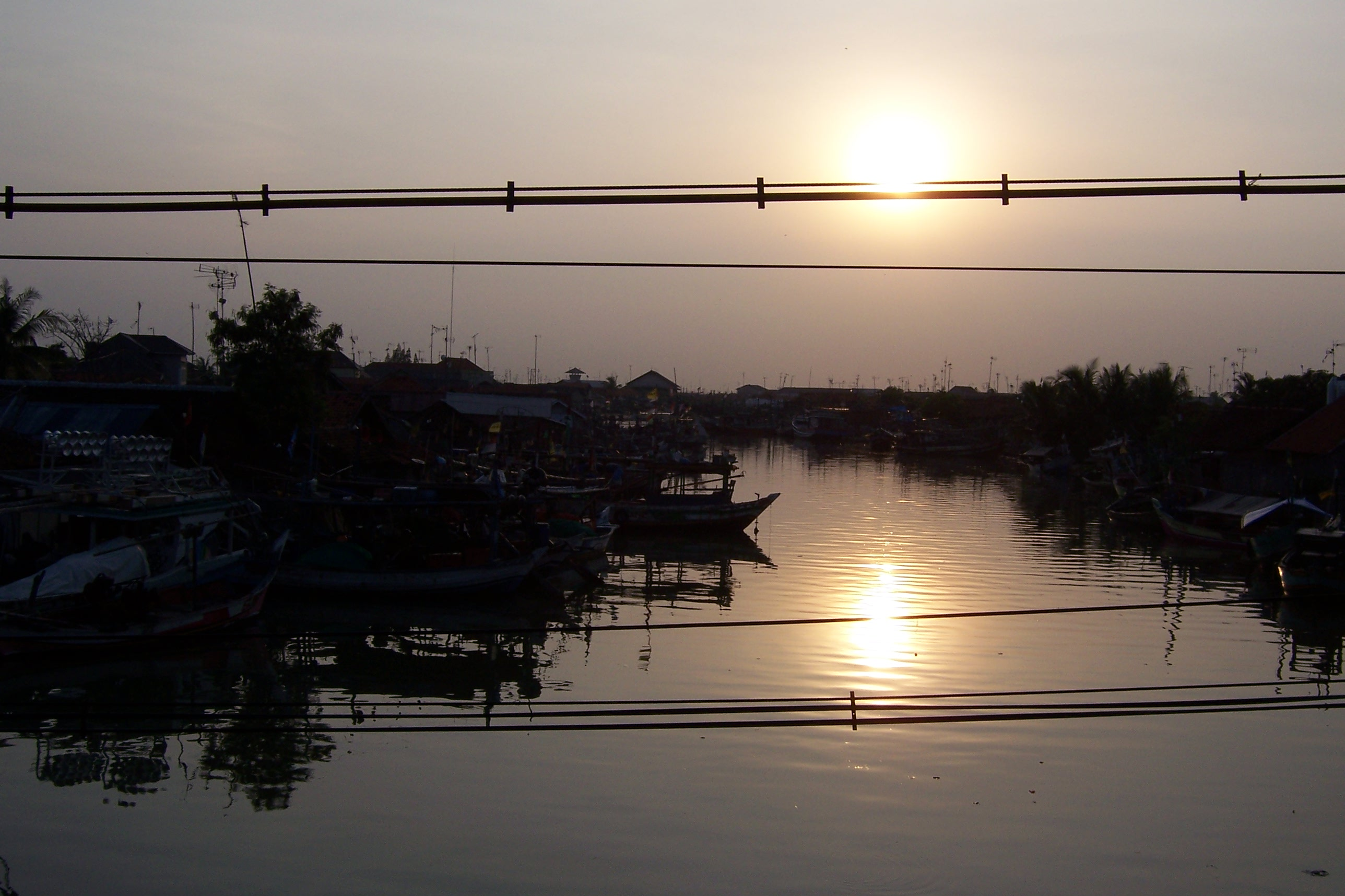 Senja Di Eretan